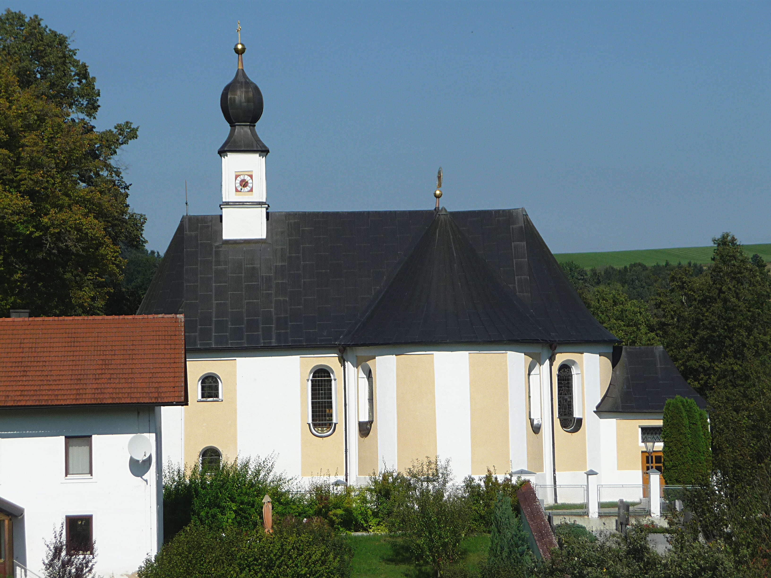 Die Expositurkirche Maria Heimsuchung in Schöllnstein